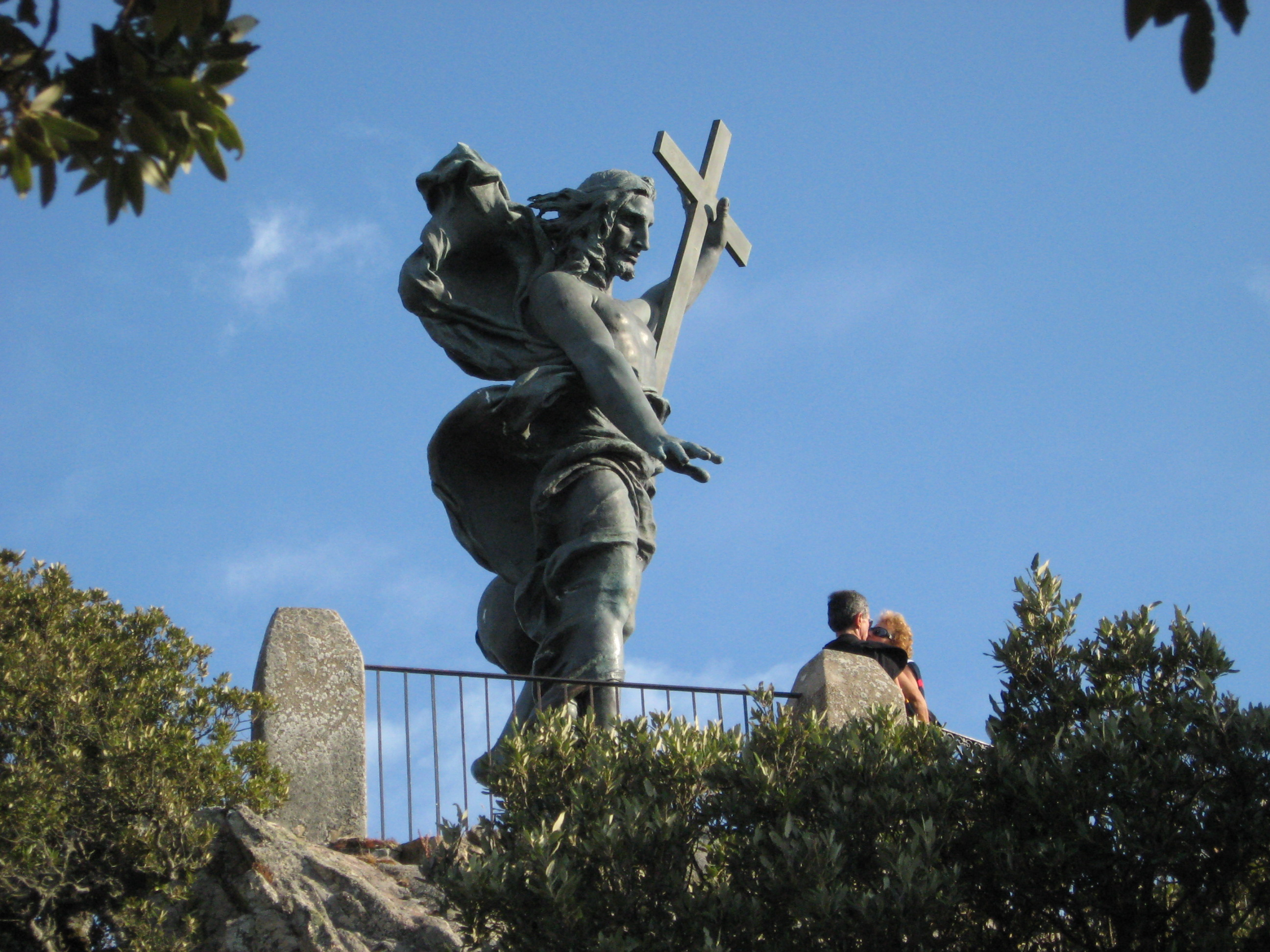 Monte Ortobene (Nuoro) (Sardegna, Italia)